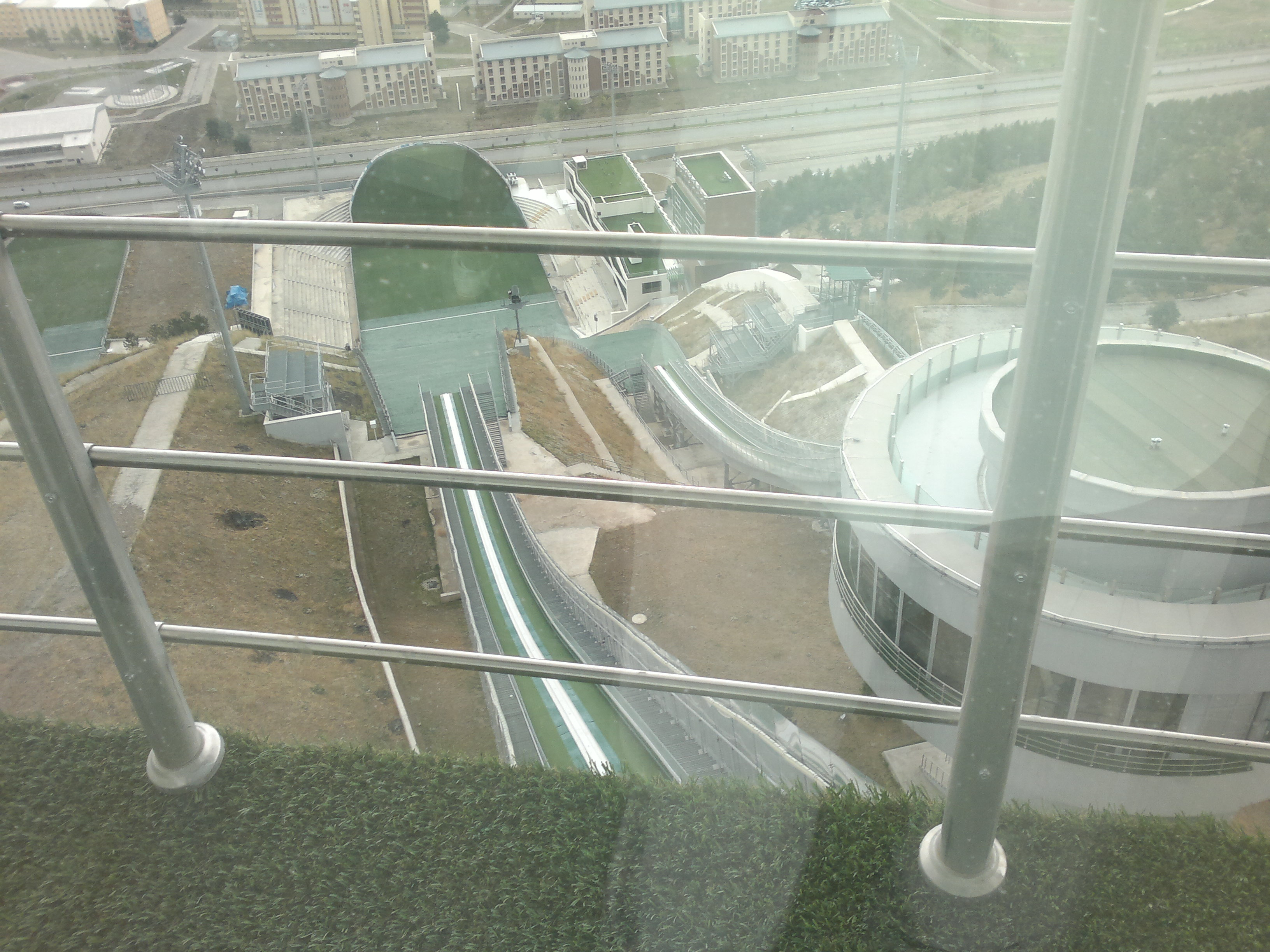 Erzurum Kiremitliktepe Kayakla Atlama Kulelerinden panaromik görünüm.